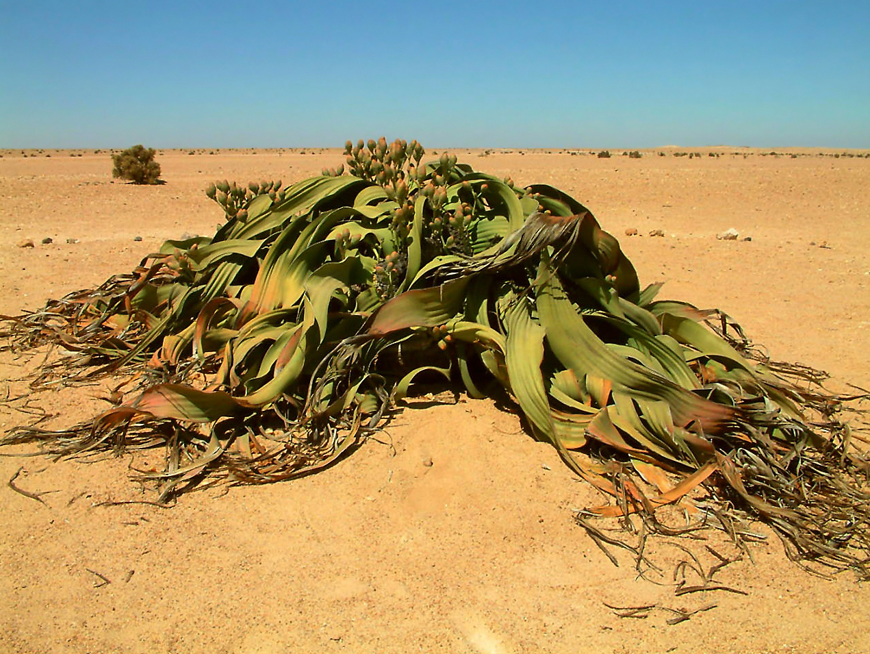 In einer der trostlosesten Landschaften der Welt wächst eine Pflanzenart, die Botaniker gelegentlich als "lebendes Fossil" beschreiben - die Welwitschia. Schön ist sie nicht, dafür aber faszinierend, wie sie so im Sand der Namib-Wüste liegt und ihre Blätter bis zu zweieinhalb Meter ausstreckt... es gibt Exemplare die älter als 200 Jahre alt sein sollen Welwitschia-Route, D-1991 / Namibia